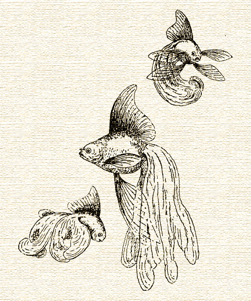 Вуалехвосты. Иллюстрация из книги Н.Ф. Золотницкого (1851 – 1920 гг) “Аквариум любителя” En: Illustration from the book, NF Zolotnitsky (1851 - 1920 years) "Aquarium lover" De: Illustration aus dem Buch, NF Zolotnitsky (1851 - 1920 Jahre) "Aquarium-Liebhaber"